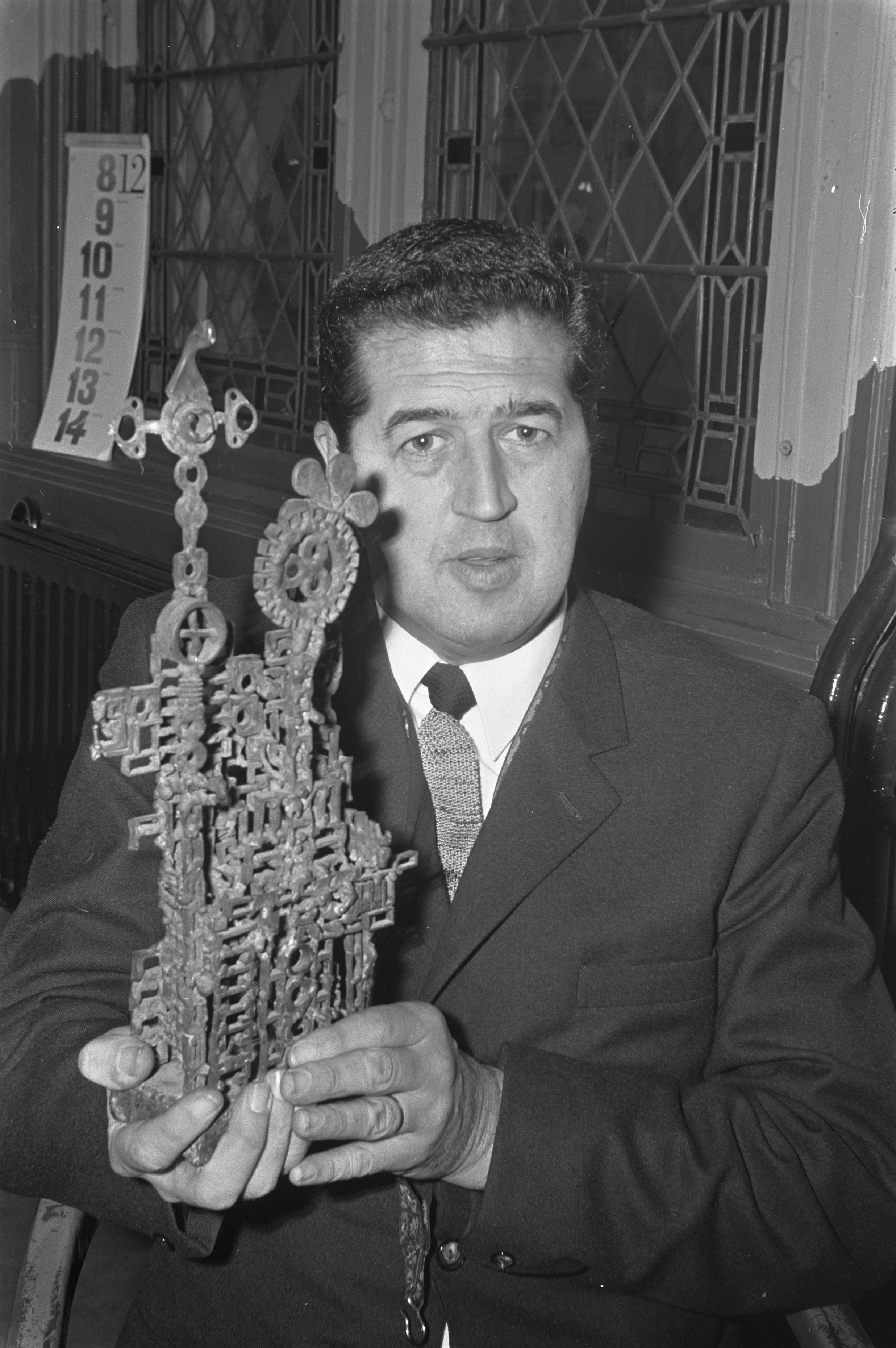 Collectie / Archief : Fotocollectie Anefo Reportage / Serie : [ onbekend ] Beschrijving : Wessel Ilcken prijs voor saxofonist Harry Verbeke. Harry Verbeke met plastiek van J. Wolters Datum : 16 december 1968 Persoonsnaam : Verbeke, Harry Fotograaf : Evers, Joost / Anefo, [onbekend] Auteursrechthebbende : Nationaal Archief Materiaalsoort : Negatief (zwart/wit) Nummer archiefinventaris : bekijk toegang 2.24.01.05 Bestanddeelnummer : 921-9465 Reacties Geplaatst door Maaike op 17 juni 2014 - 16:03. Locatie: Paradiso Plaats: Amsterdam, Noord-Holland